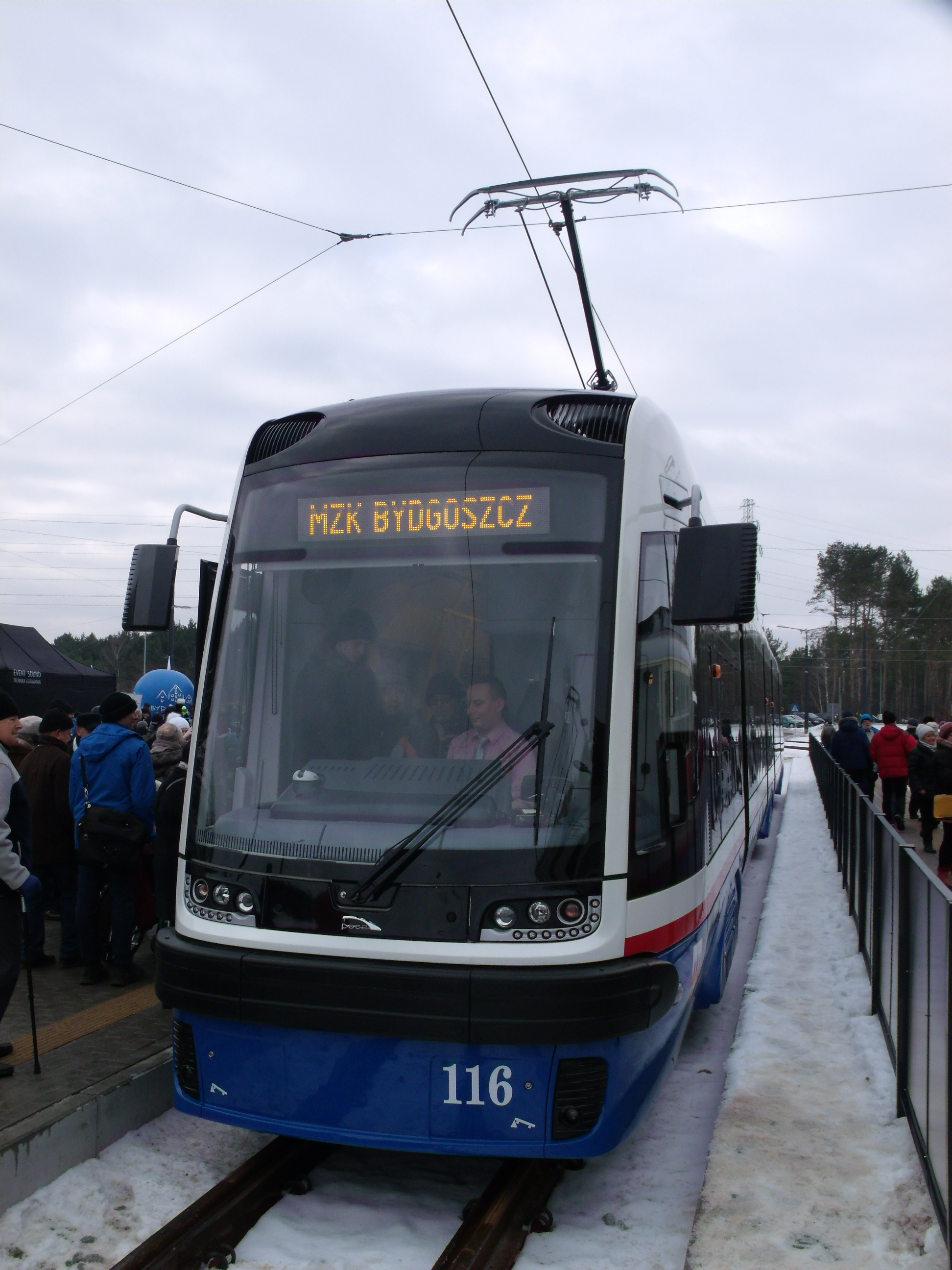 Pesa 122NaB Swing